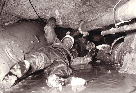 I november 1965 kämpade två tunnelbyggare för sina liv, instängda i en kilometerlång tunnel, 42 meter under jord på Söder i Stockholm.